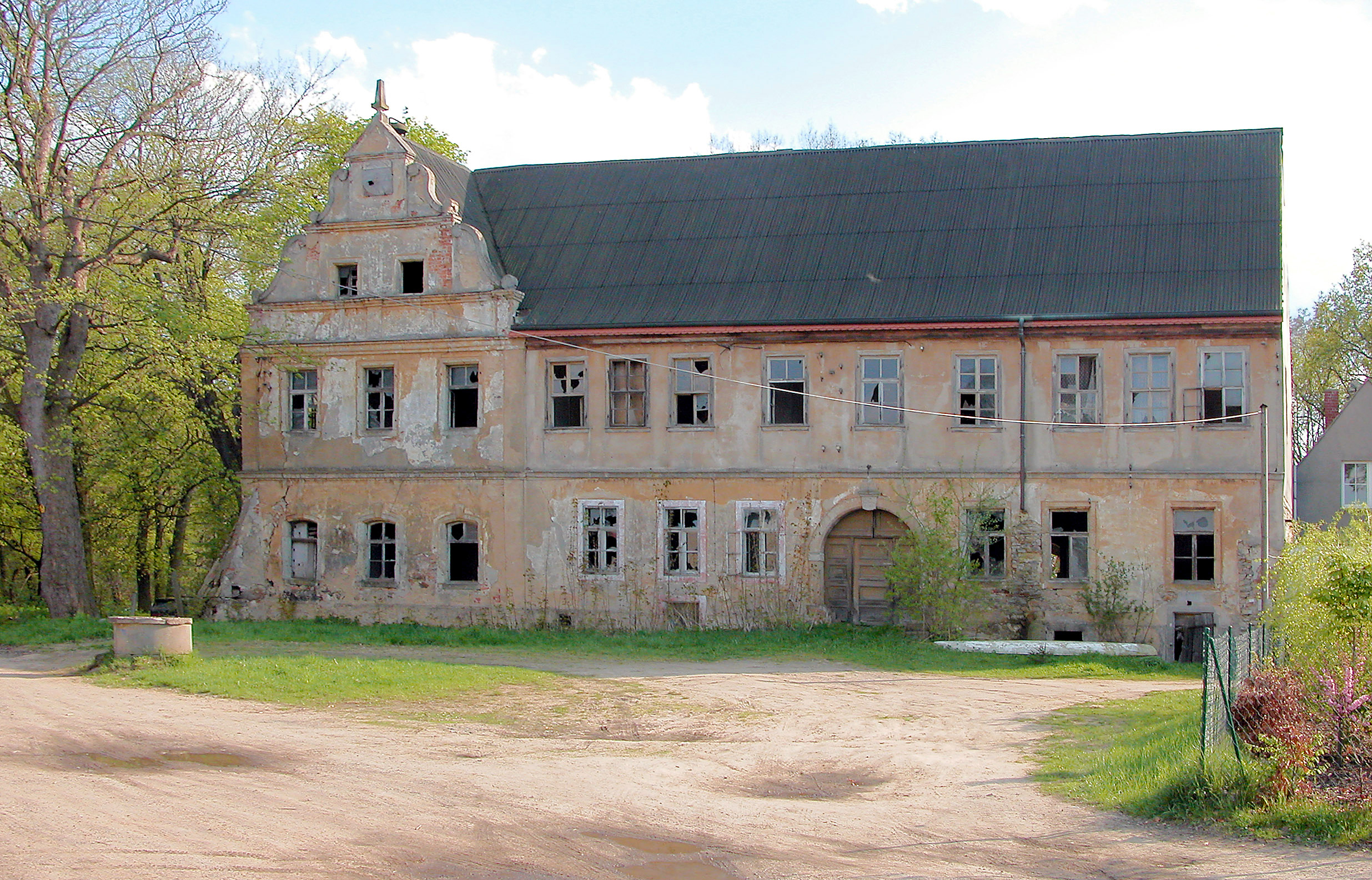 01.05.2006 01561 Cunnersdorf (Gemeinde Ebersbach): Schloß, Hofseite. Der Rittergutsbesitzer Christian Zschimmer errichtete 1656 den Gebäudeteil mit den Renaissancegiebeln. Der Schlußstein über der mittigen Tordurchfahrt zeigt die Jahreszahl 1787, als C. H. von Zittwitz den rechten Flügel anbaute. Das Herrenhaus wurde in der DDR und danach noch bis 1991 als Wohnhaus genutzt. Es folgten wechselnde Privatisierungen. [DSCN8903.TIF]20060501110.JPG(c)Blobelt